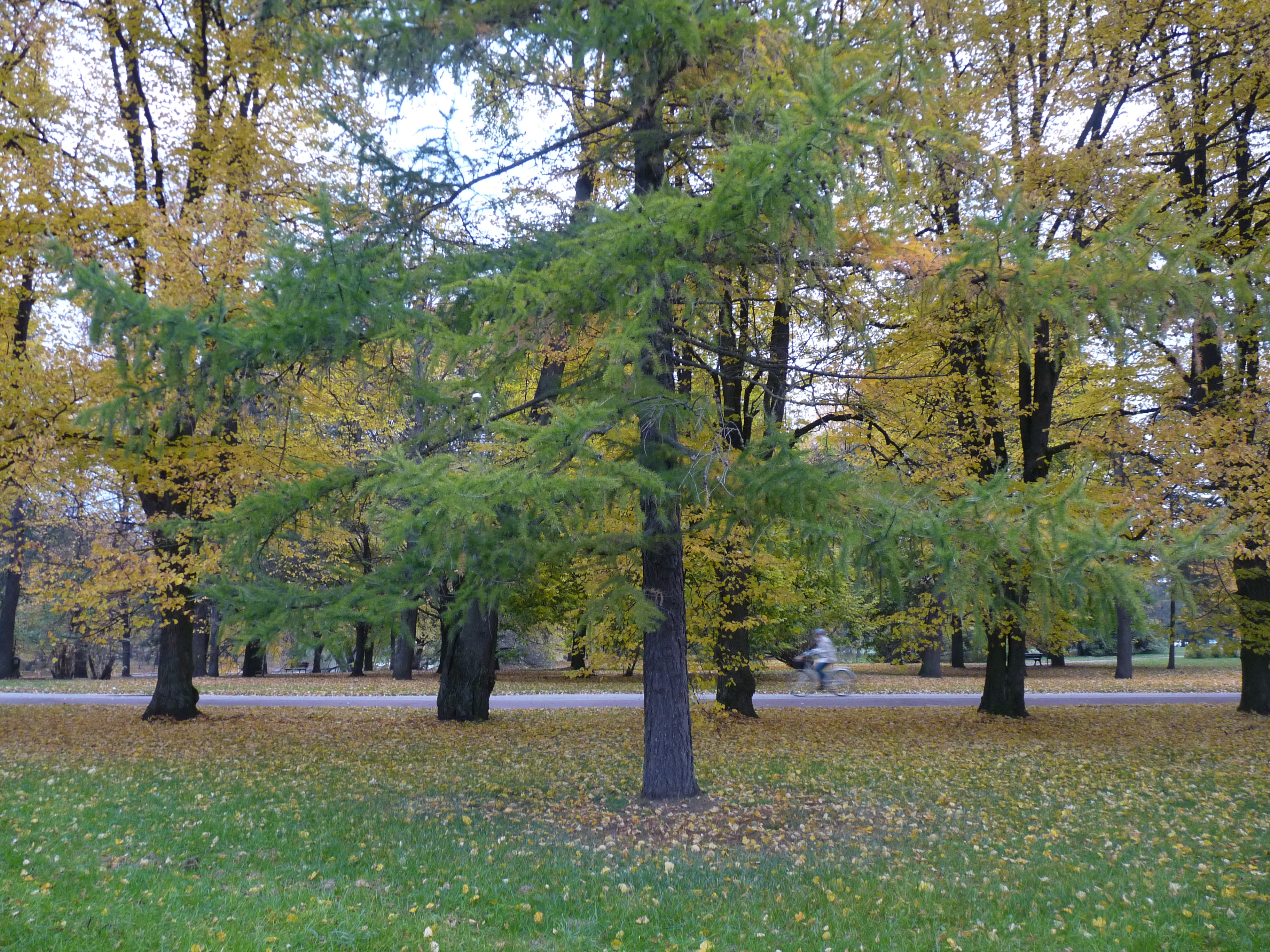 Sygis Tartus Holmi pargis, 23. oktoober 2012.